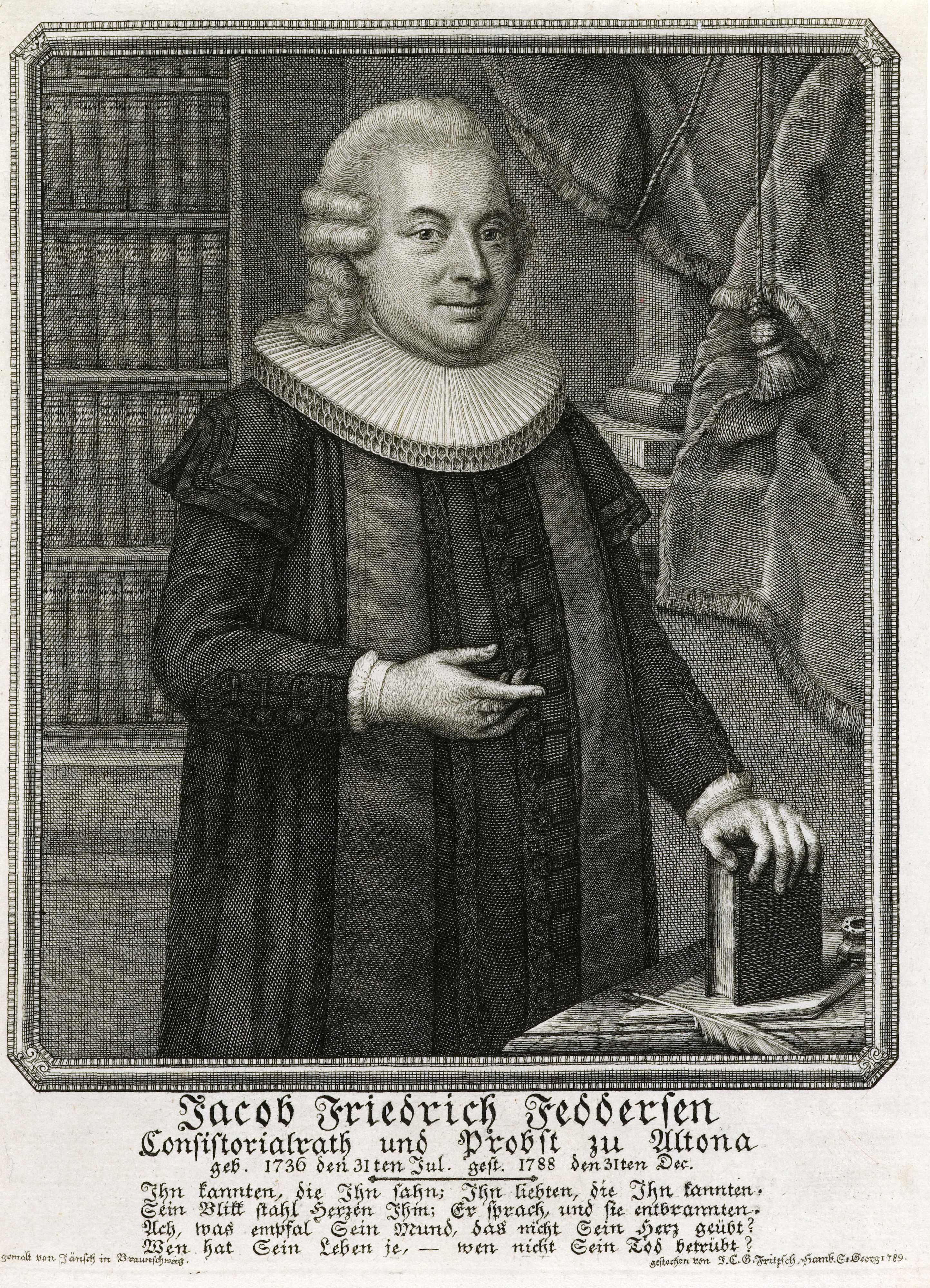 Jacob Friedrich Feddersen